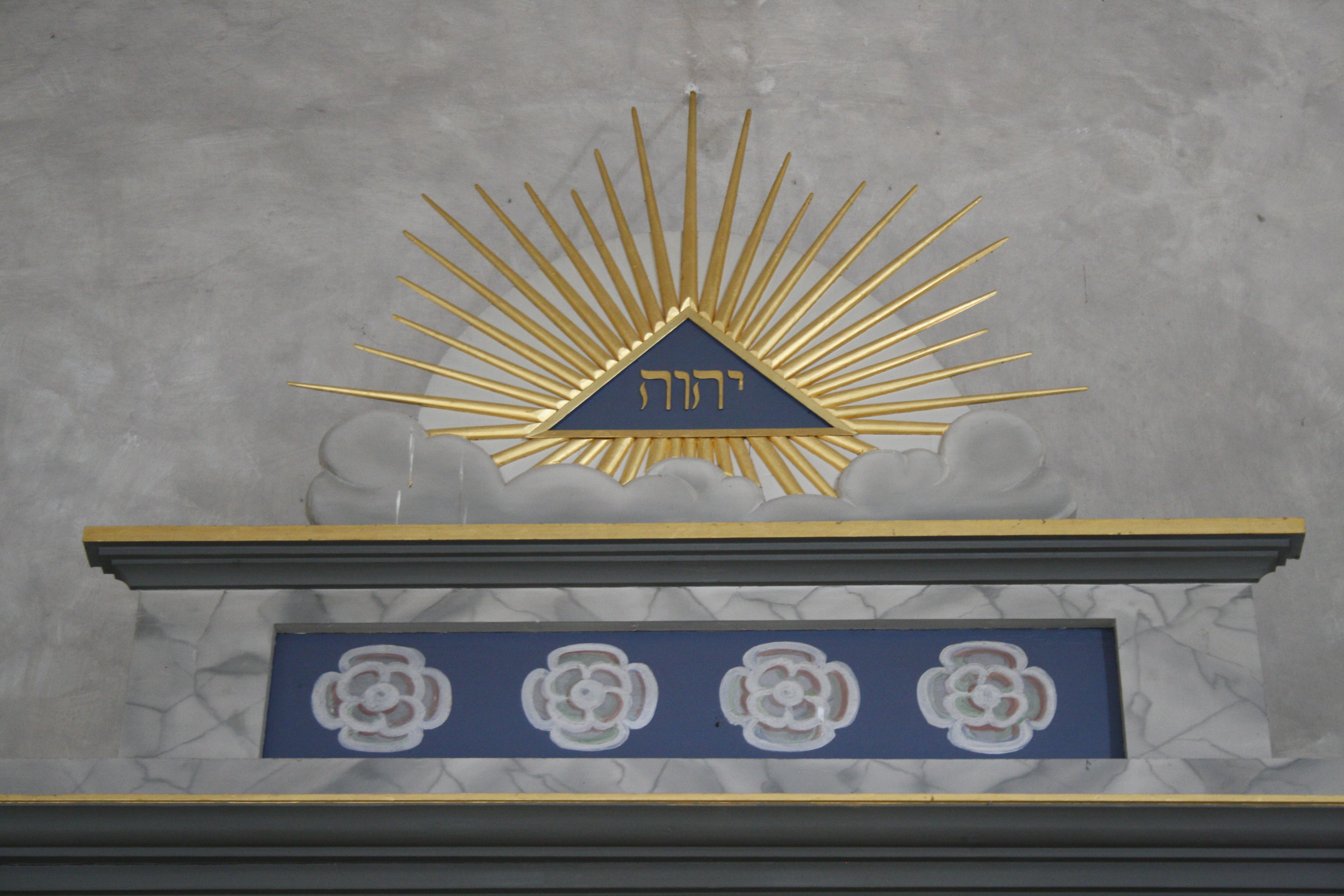 Dreieck mit Inschrift JHWH als Symbol Gottes über dem Altar der Kirche in Ballum, Nordschleswig